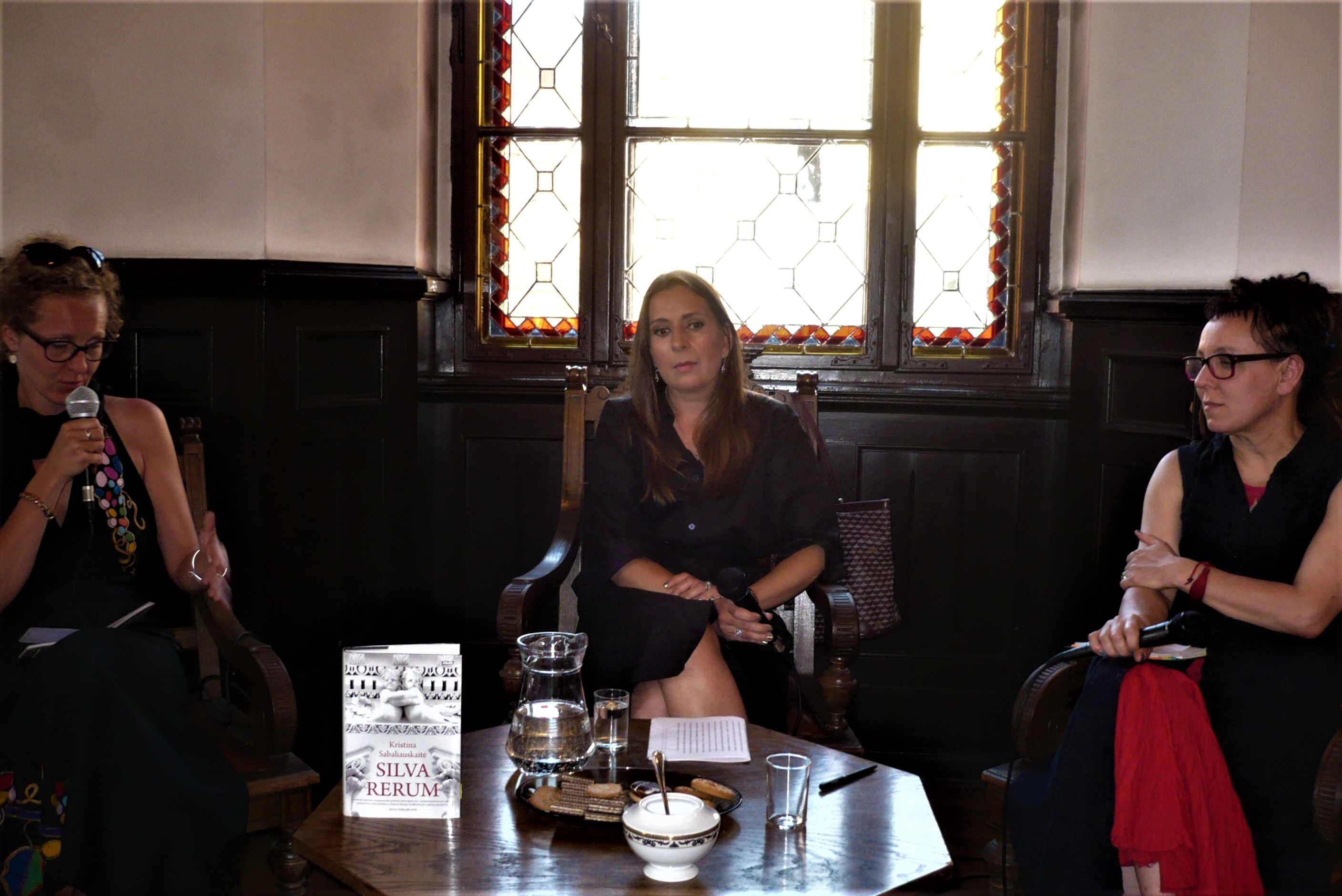 Kristiną Sabaliauskaitė i powieść "Silva rerum". Festiwal Góry Literatury, 6.07.2017